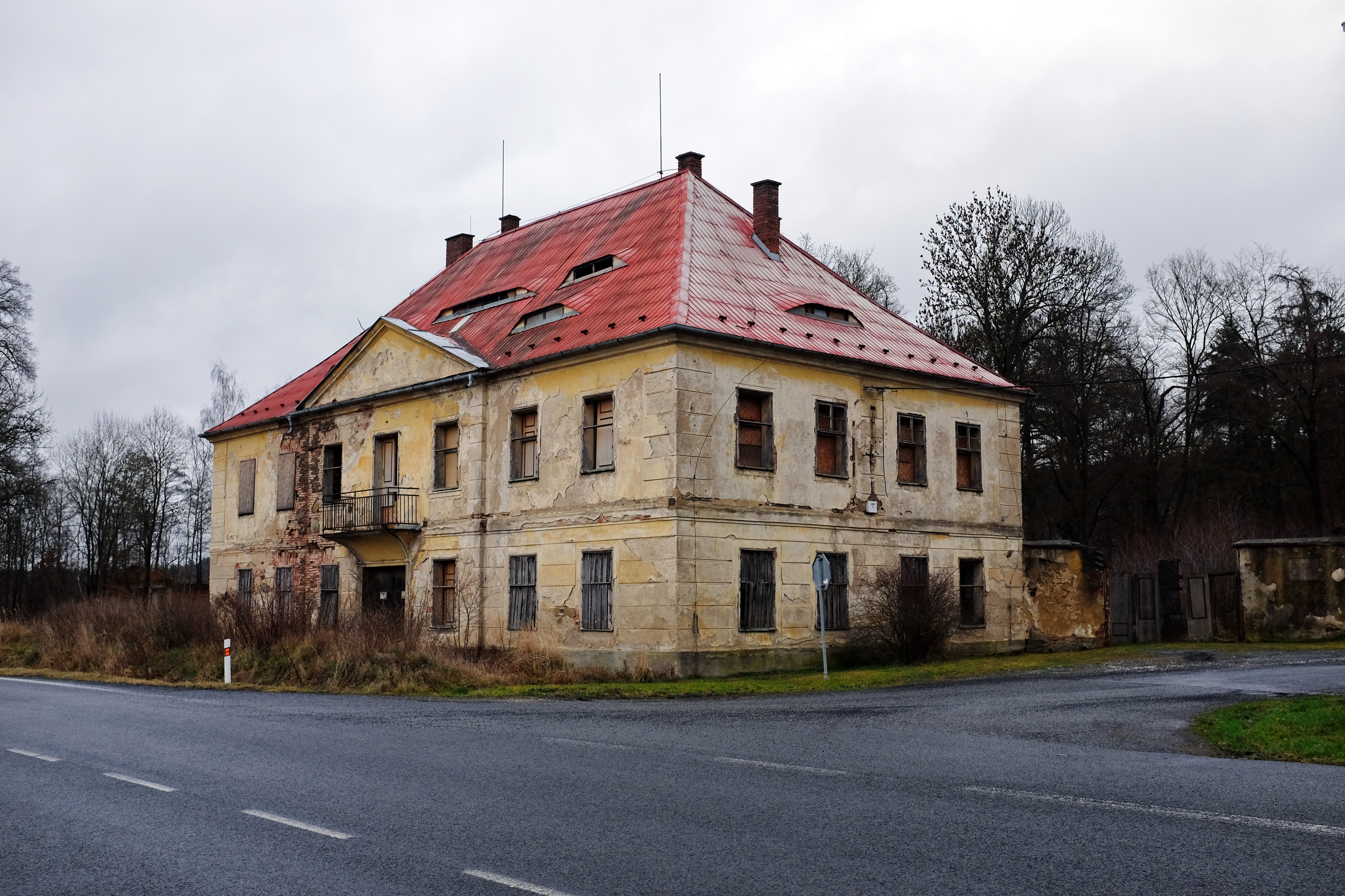 Zájezdní hostinec Spiegel, Arnoltov 52, při silnici na rozcestí k Arnoltovu, Arnoltov.